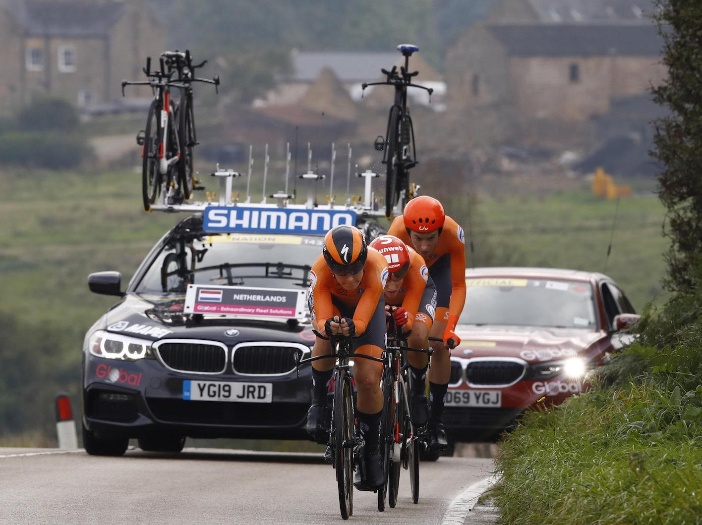 The Netherlands team in the mixed team time trial relay in Yorkshire